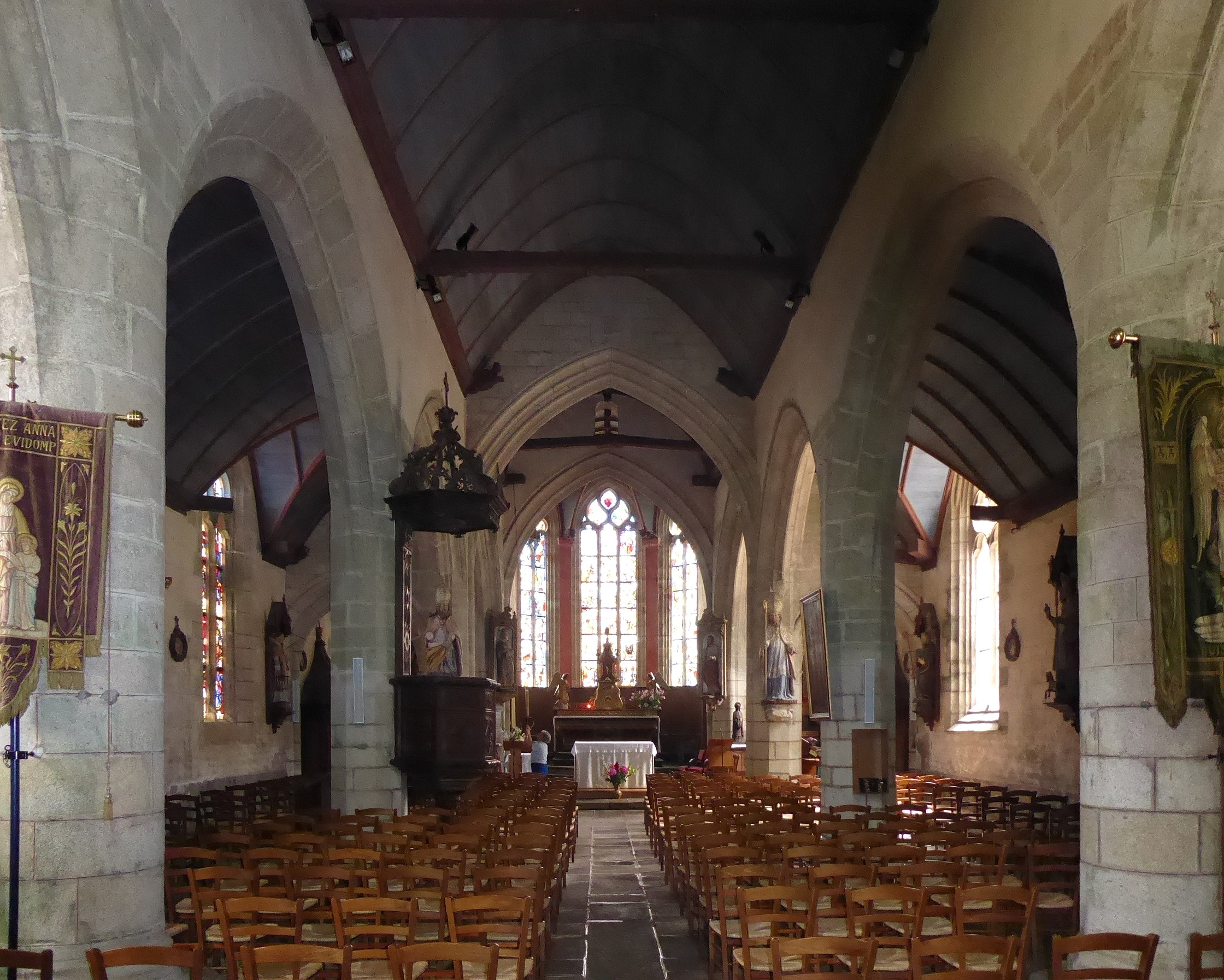 Église Notre-Dame (Confort-Meilars)